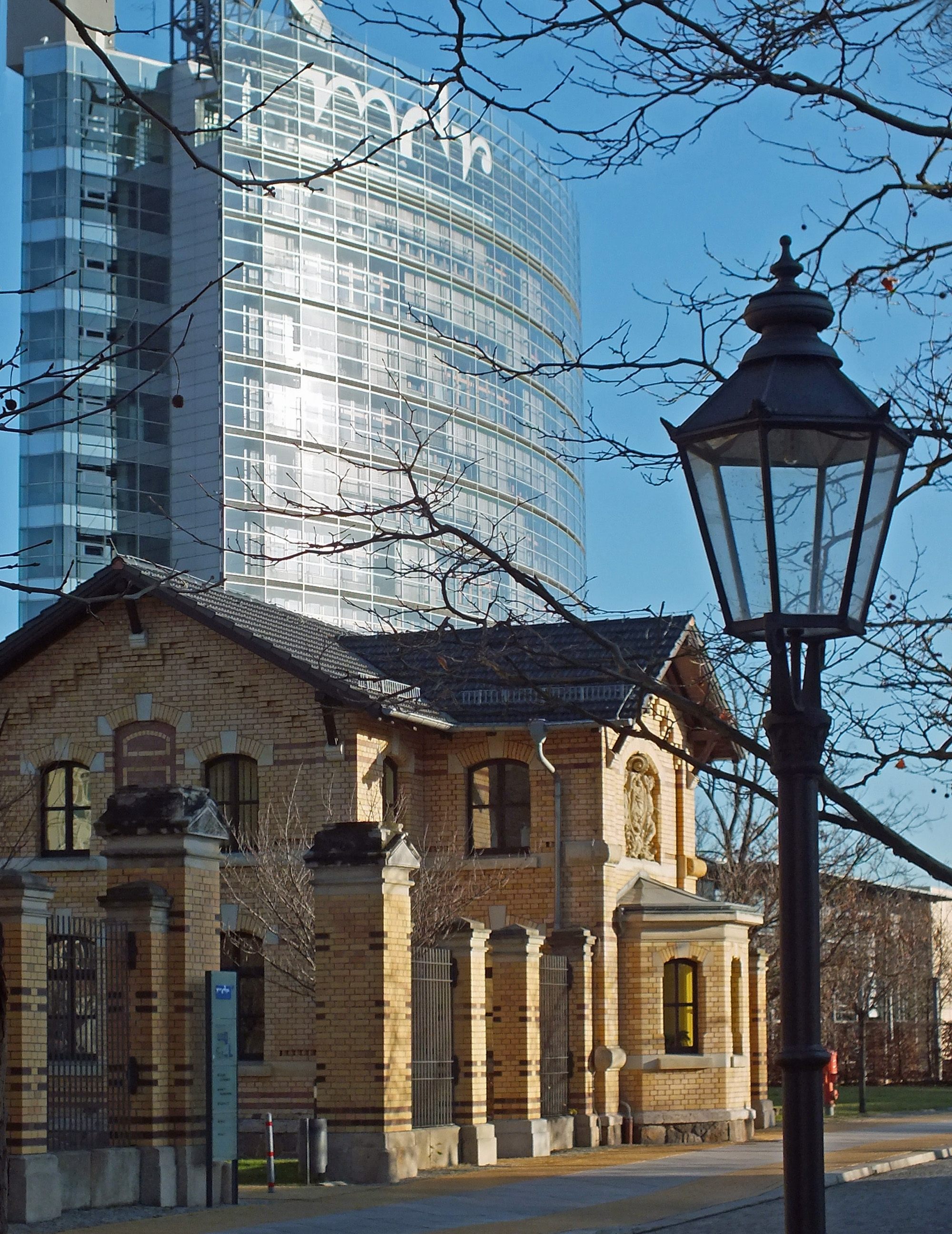 Schlachthofbau von Hugo Licht und MDR-Hochhaus auf dem Gelände des MDR in Leipzig